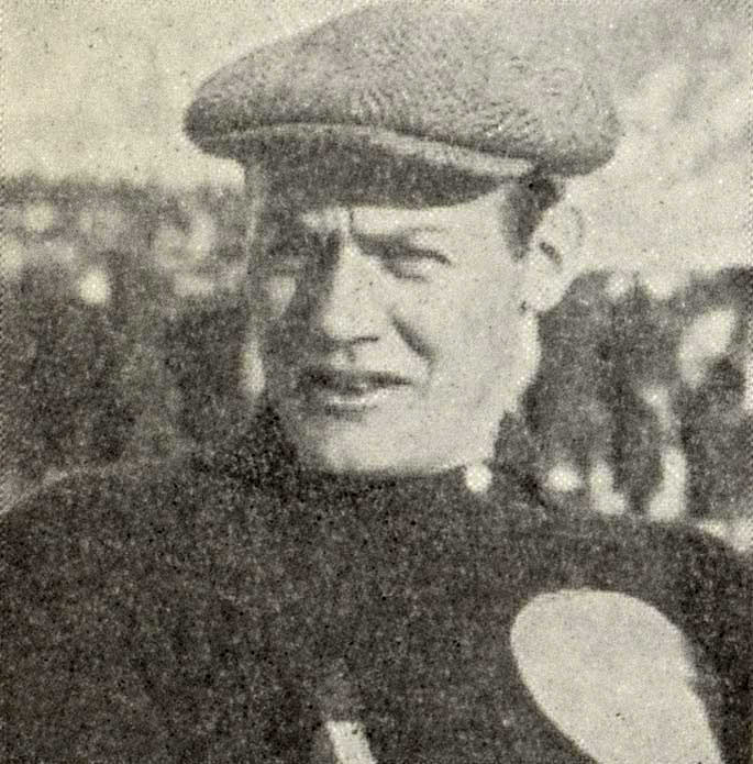 Gustaf Johansson